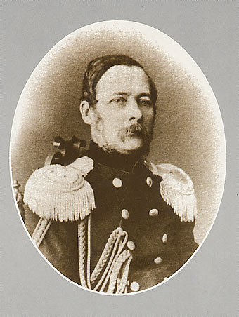 Портрет Антона Ивановича Штукенберга